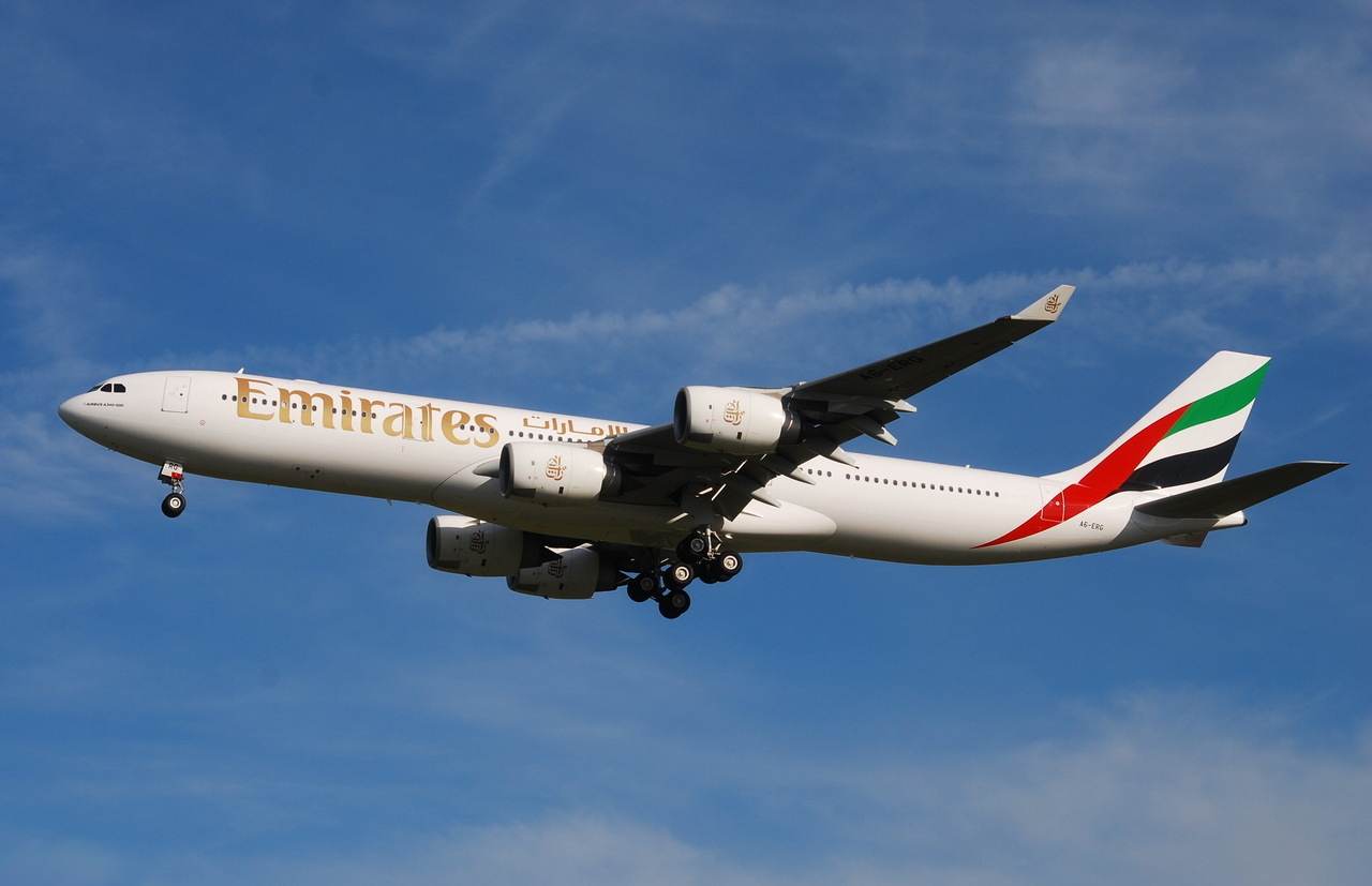 Photo prise à l'aéroport de Toulouse-Blagnac (LFBO) en France. Picture take at Toulouse-Blagnac Airport (LFBO) in France.